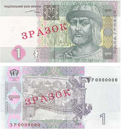 1-Hrywnja-Schein-2004